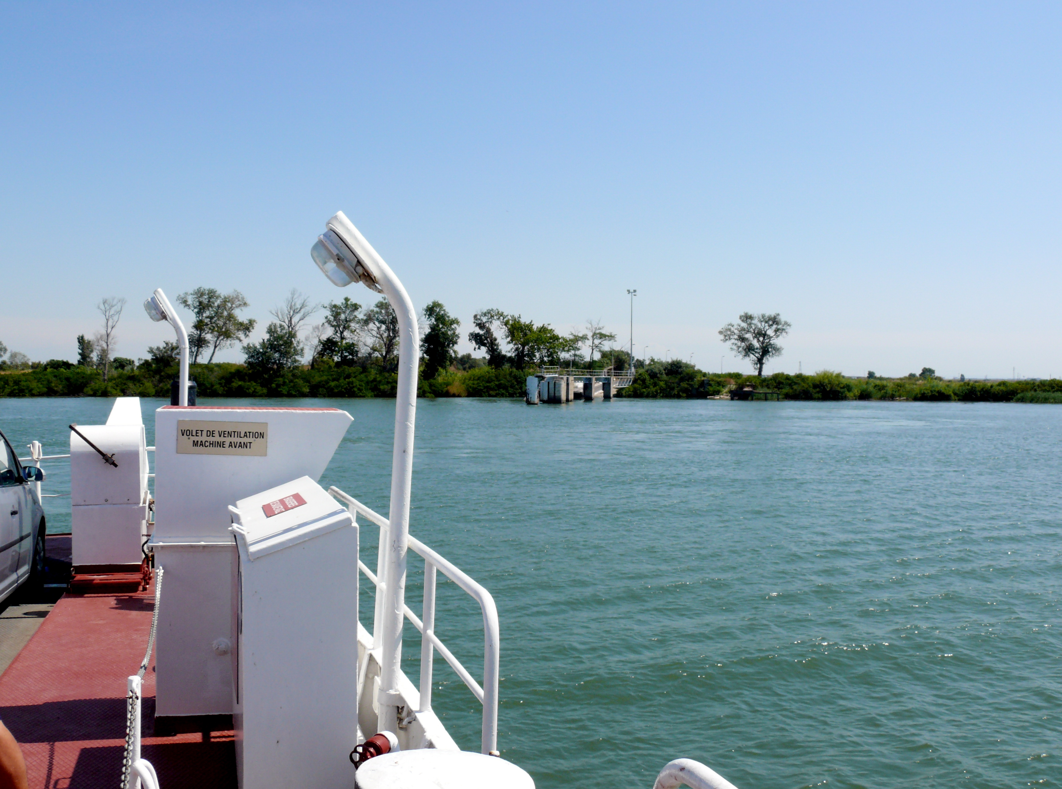 Le Barcarin approchant de l'apontage du côté du parc naturel régional de Camargue